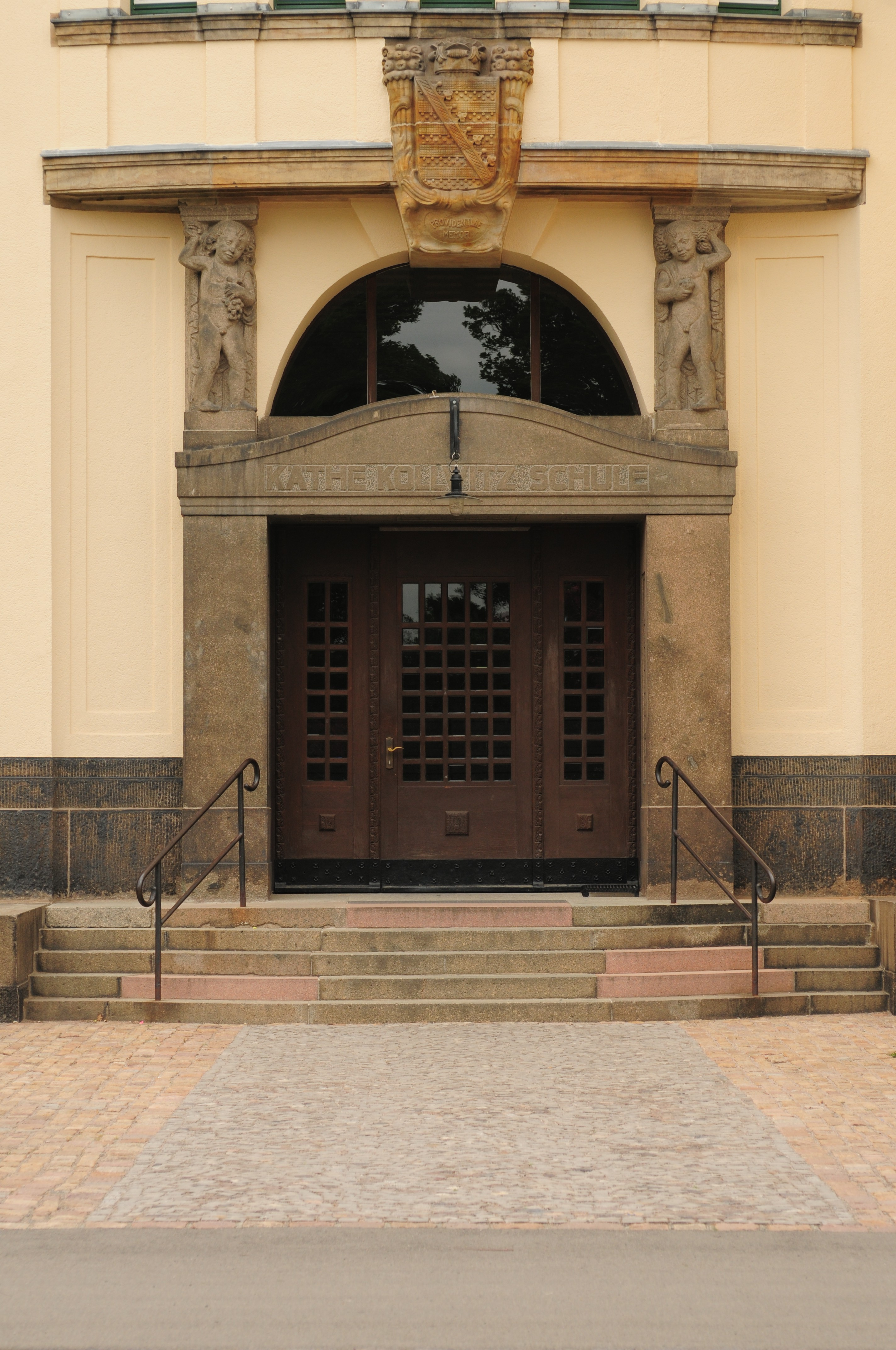 Käthe-Kollwitz-Gymnasium in Zwickau, Hauptportal, ehemaliges Lehrerseminar Zwickau (Sachsen, Deutschland)